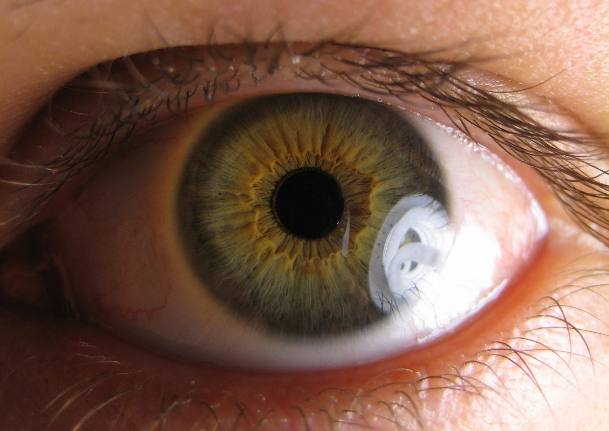 A hazel eye.